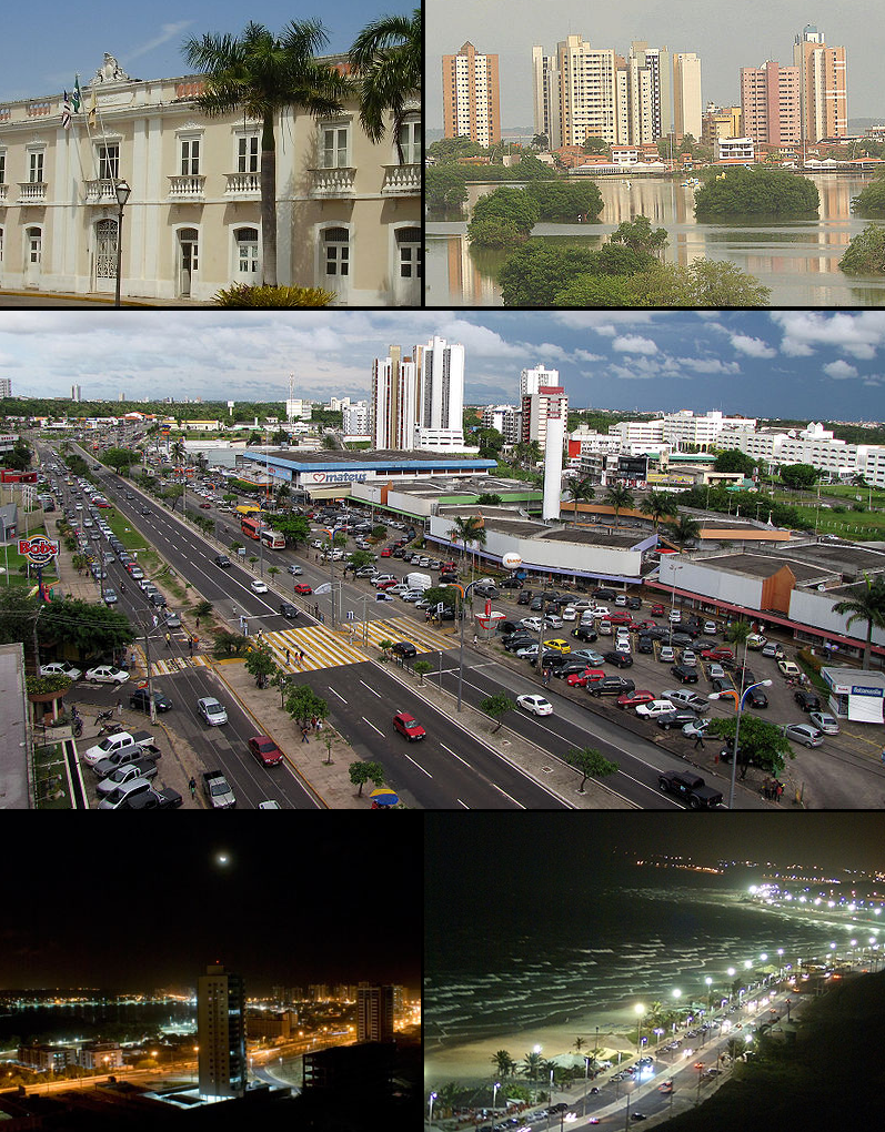 Imagens de São Luís.